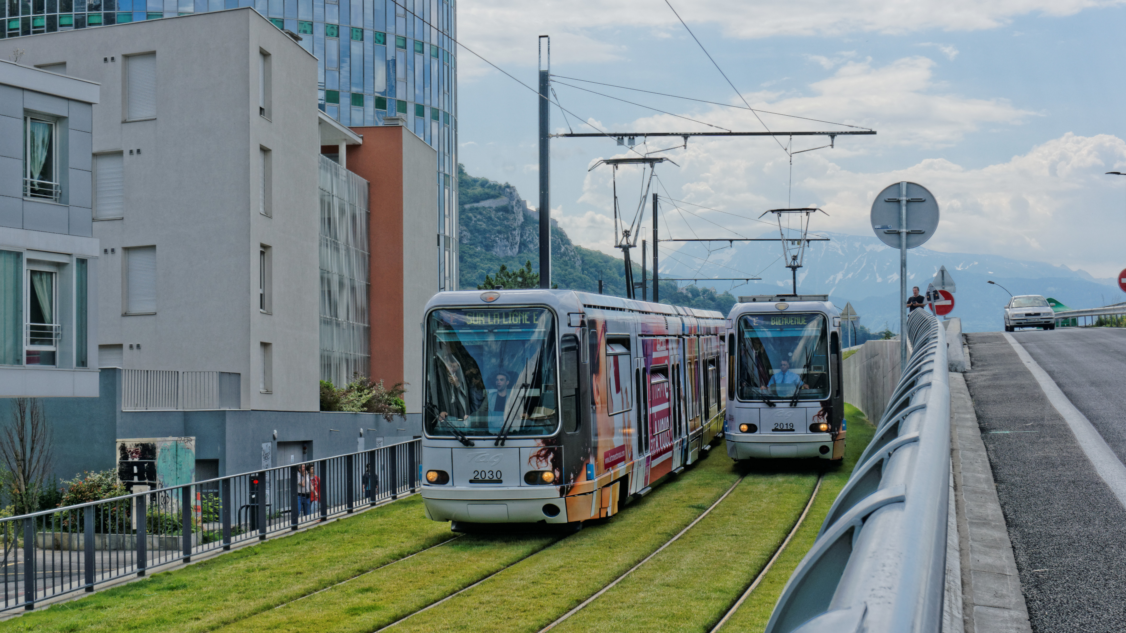 Le convoi inaugural de la ligne E du tramway de Grenoble le 28-06-2014 arrive au terminus de Saint-Martin-le-Vinoux